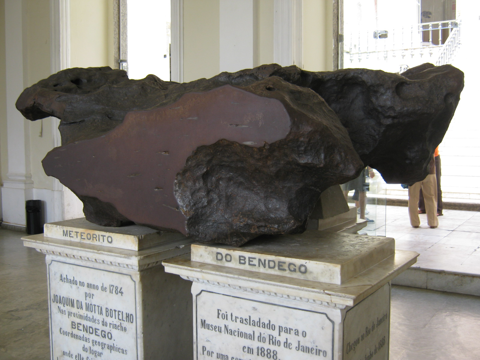 Bendegó meteorite, front, National Museum, Rio de Janeiro.